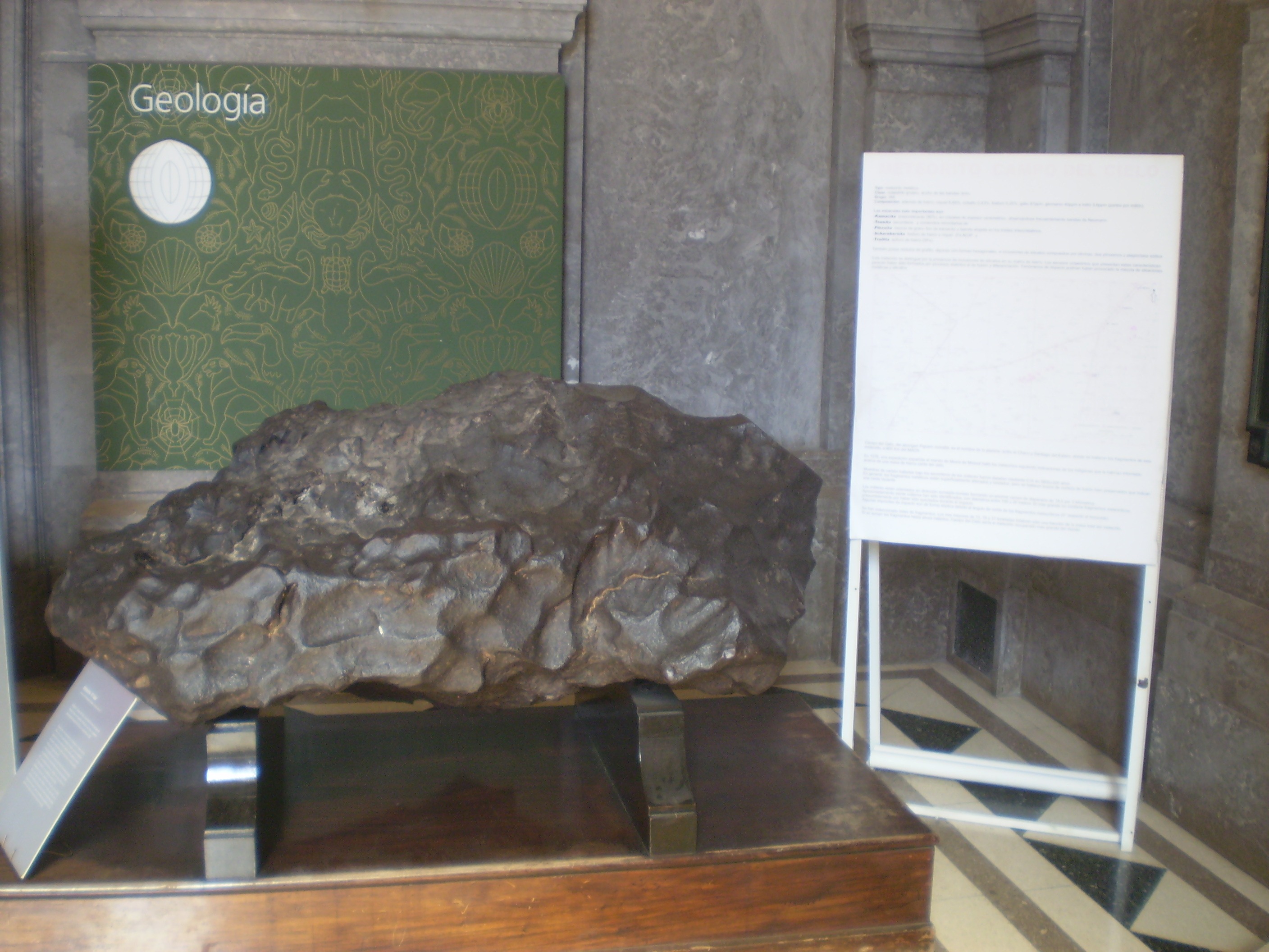 El Toba meteorite, a synonym for Campo del Cielo. Museo Argentino de Ciencias Naturales "Bernardino Rivadavia".